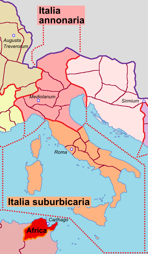 Diocesi Italia verso il 400 dell'era moderna.